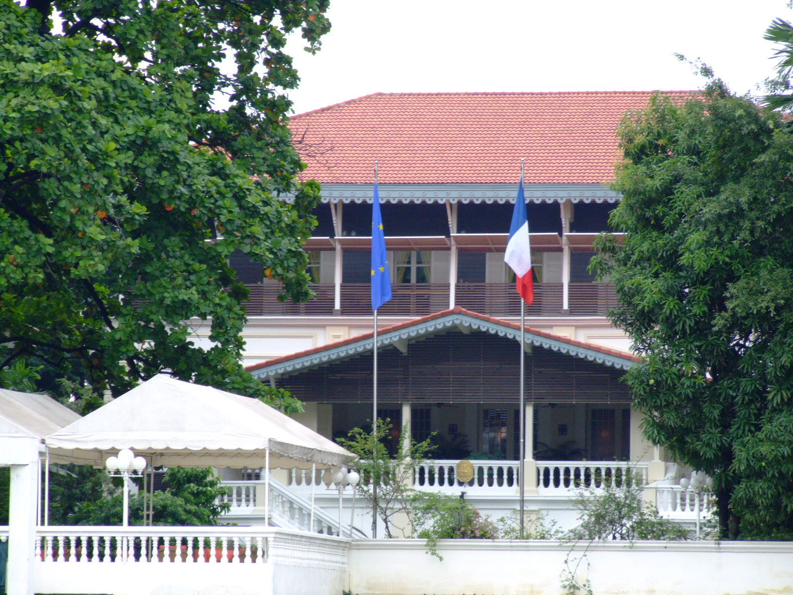 สถานเอกอัครราชทูตฝรั่งเศสประจำประเทศไทย